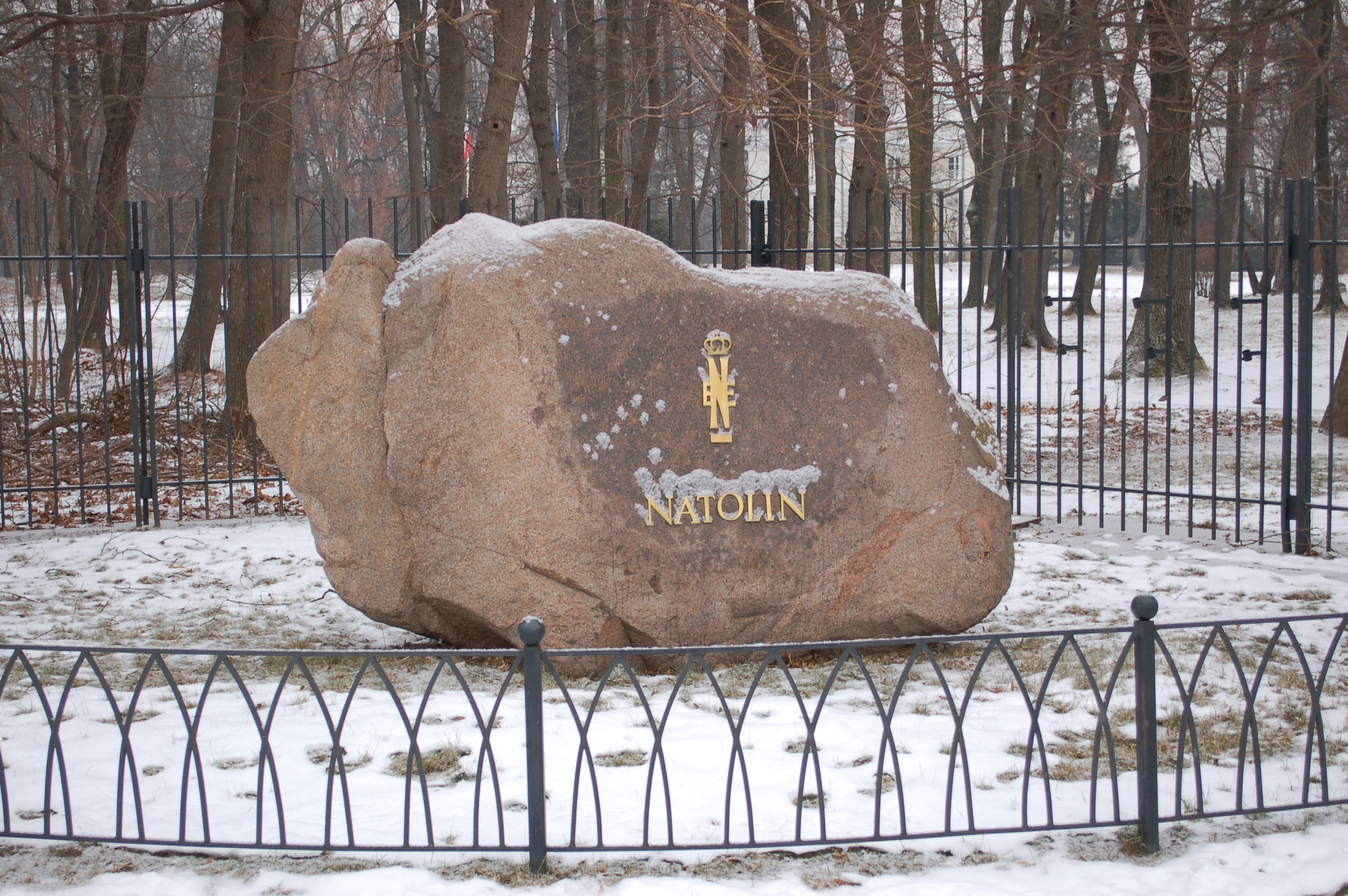 Natolin, Warsaw, European College